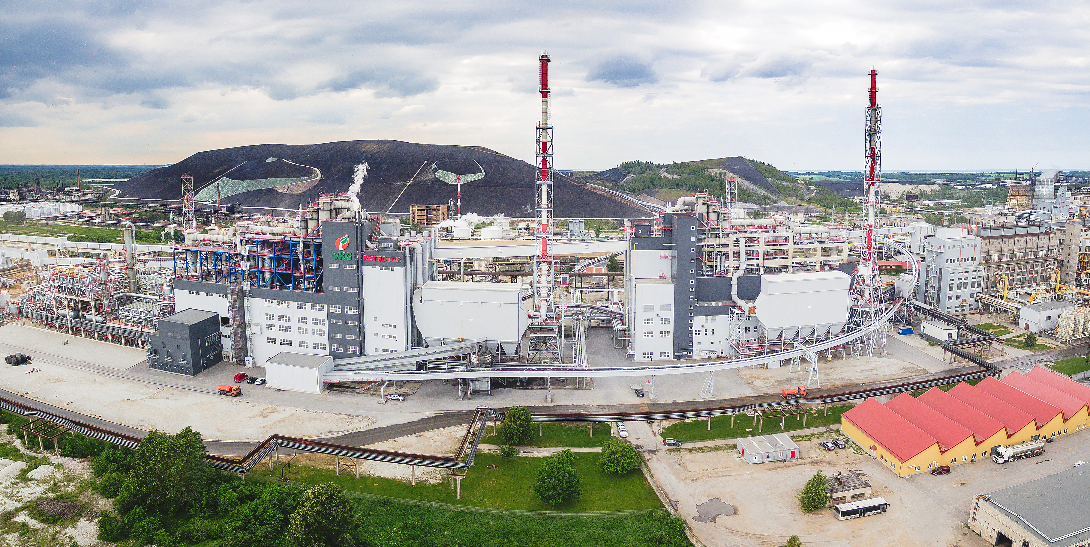 VKG panoraam.